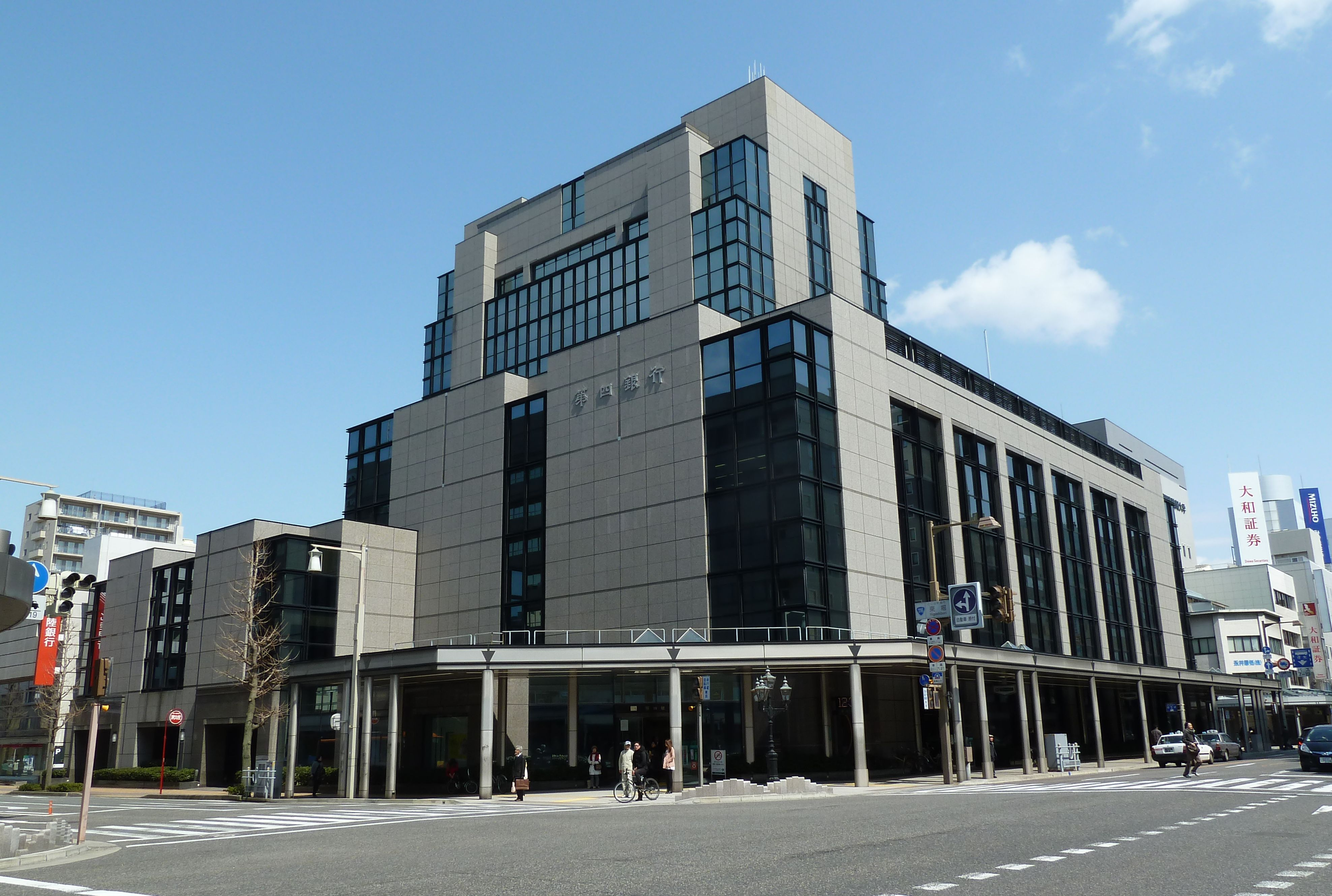 第四銀行本店